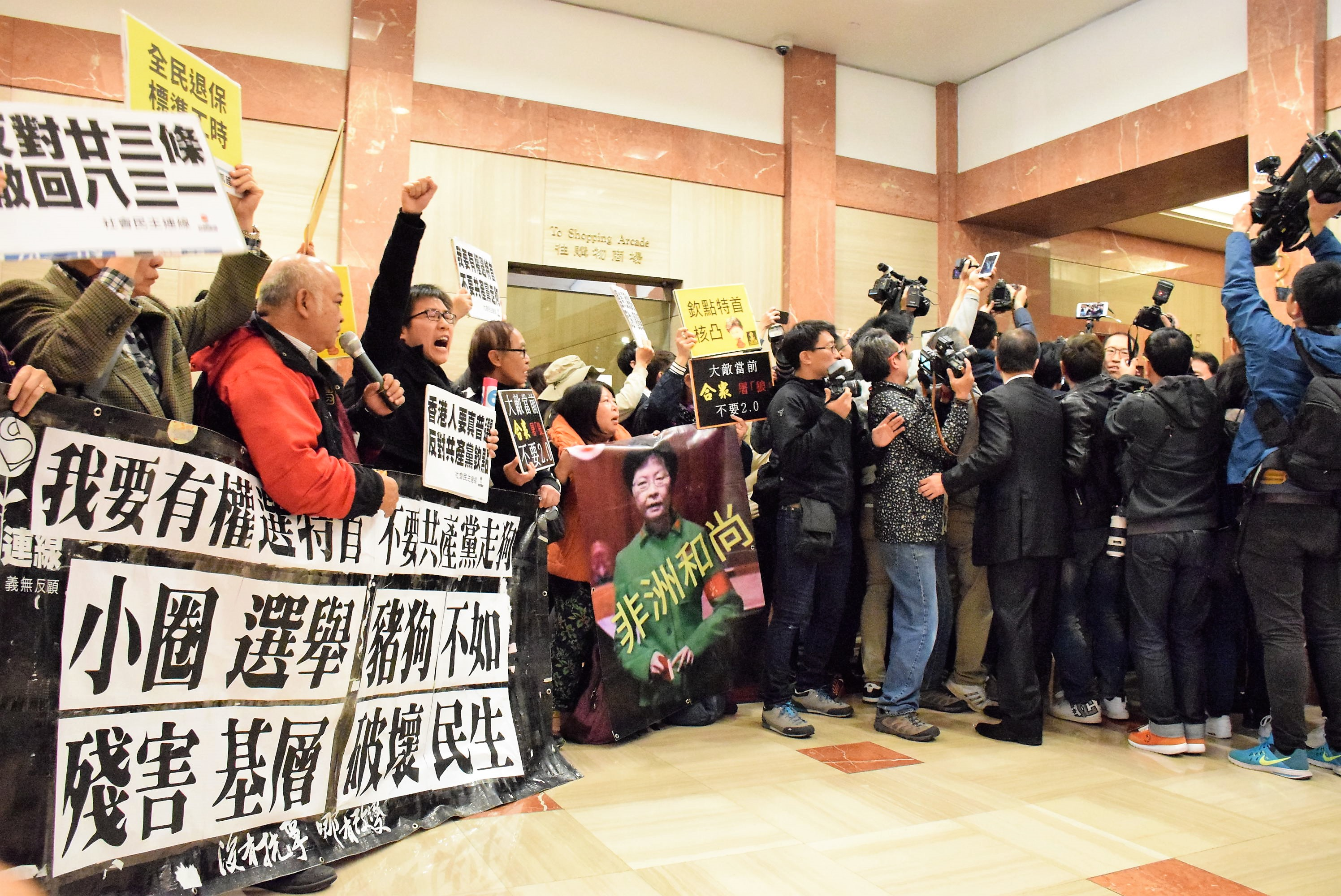 中文（香港）: 示威者在大廈大堂等候林鄭月娥。（美國之音湯惠芸攝）